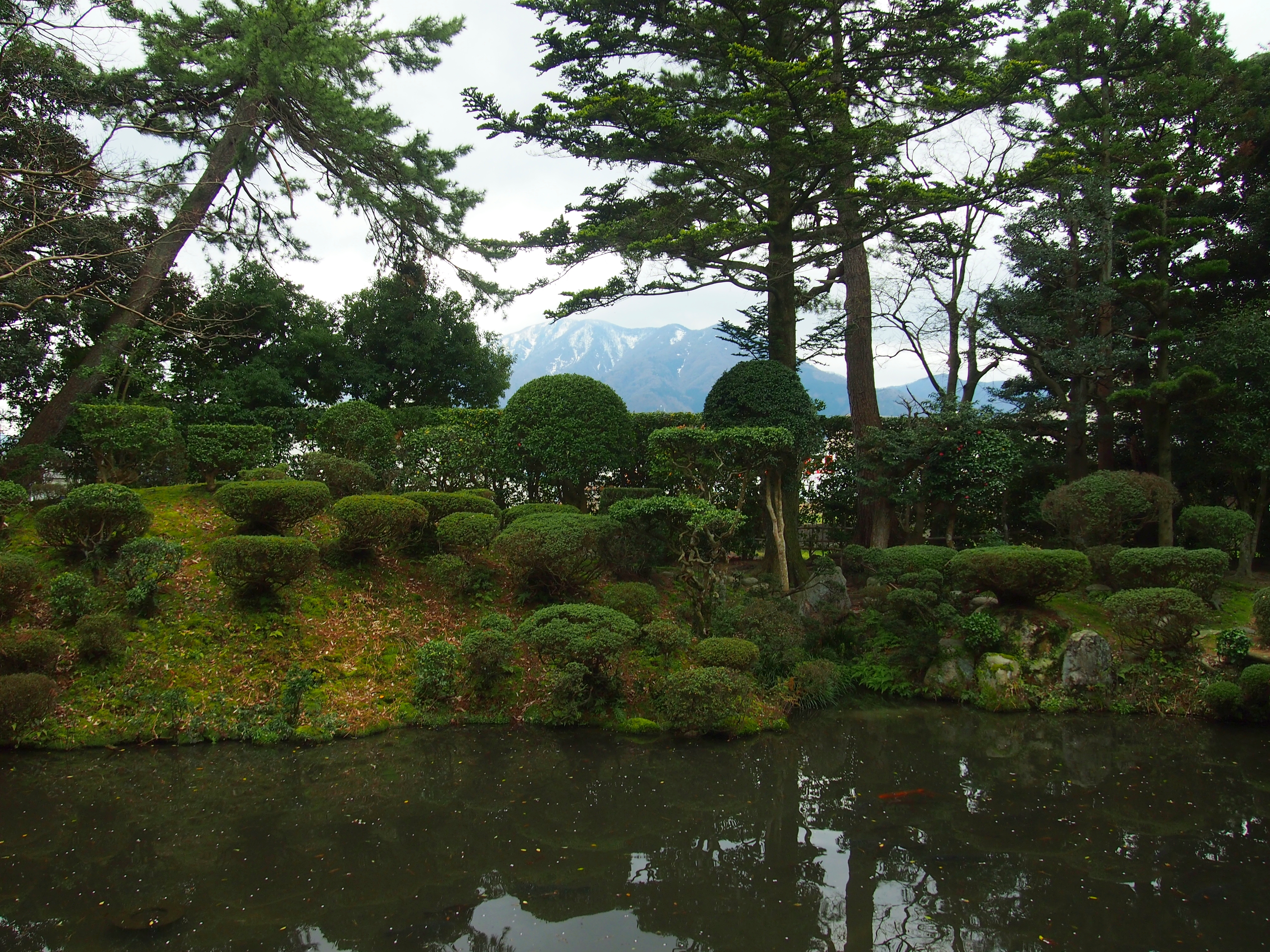 名勝柴田氏庭園の借景の野坂岳